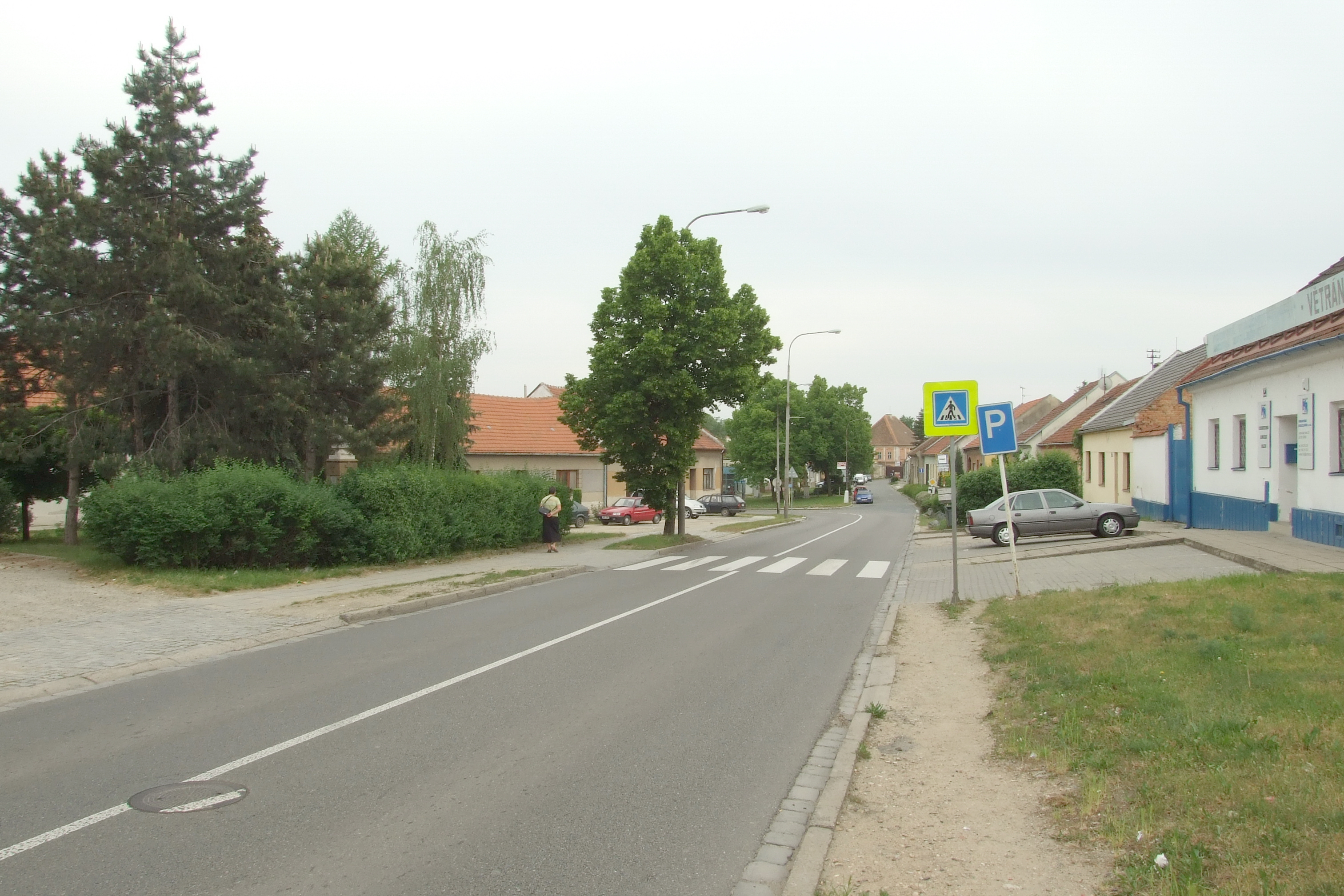 Brněnské Ivanovice - Ivanovické náměstí